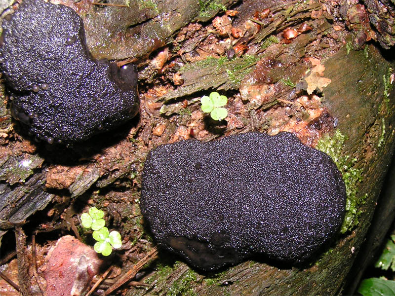 A myxomycete